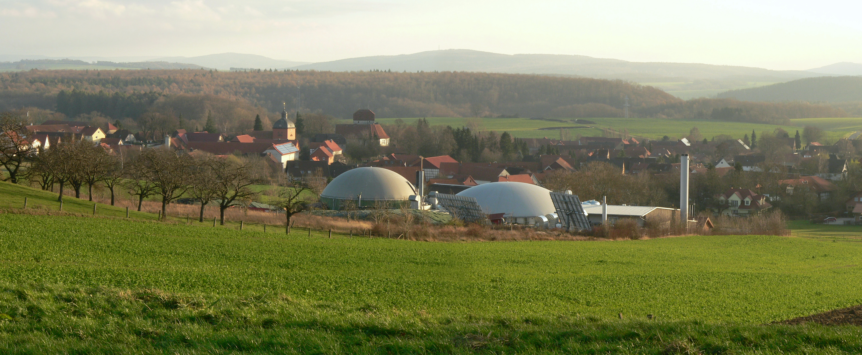 Jühnde